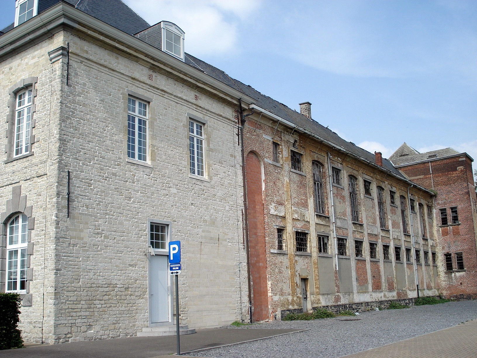 Sint-Bernardusabdij Hemiksem (prov. Antwerpen). Zuidgevel.